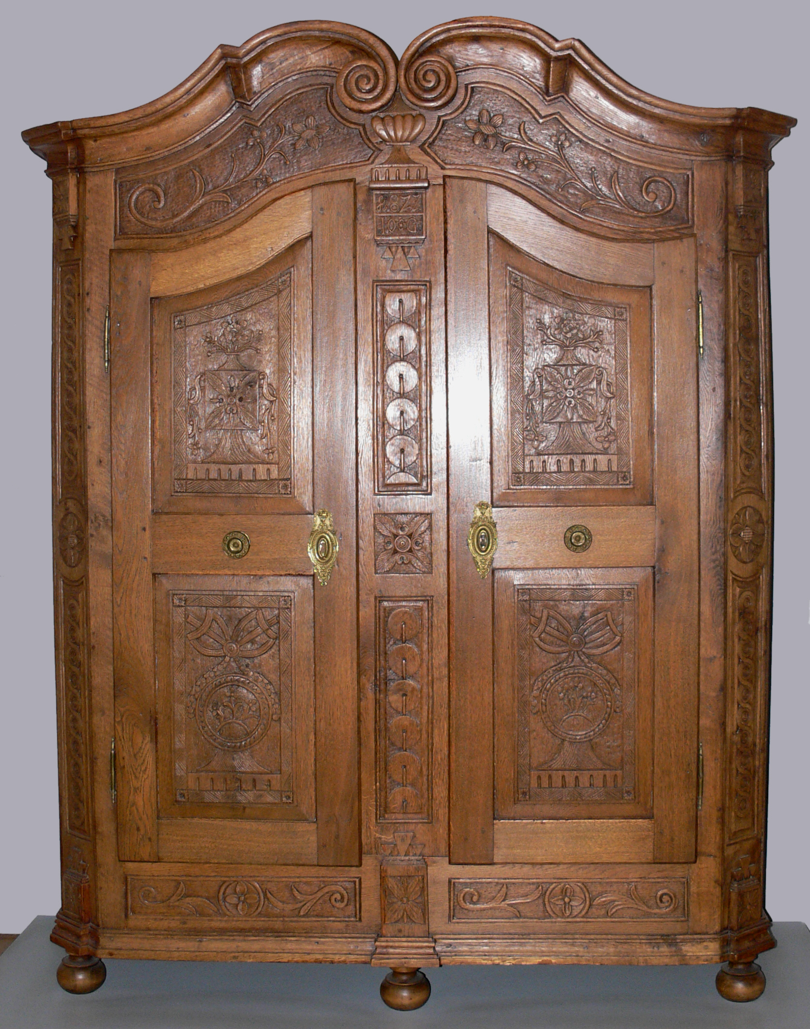 Eichenschrank aus Oberschwaben Landesmuseum Württemberg (Außenstelle Museum für Volkskultur in Württemberg, Waldenbuch)